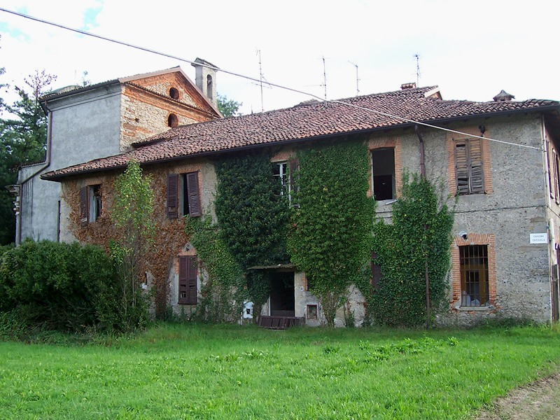 Canonica Lambro - Cascina Chiesuola